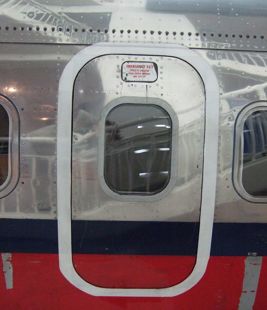 Notausstieg über der Tragfläche einer Boeing 737. Overwing emergency exit of a Boeing 737.